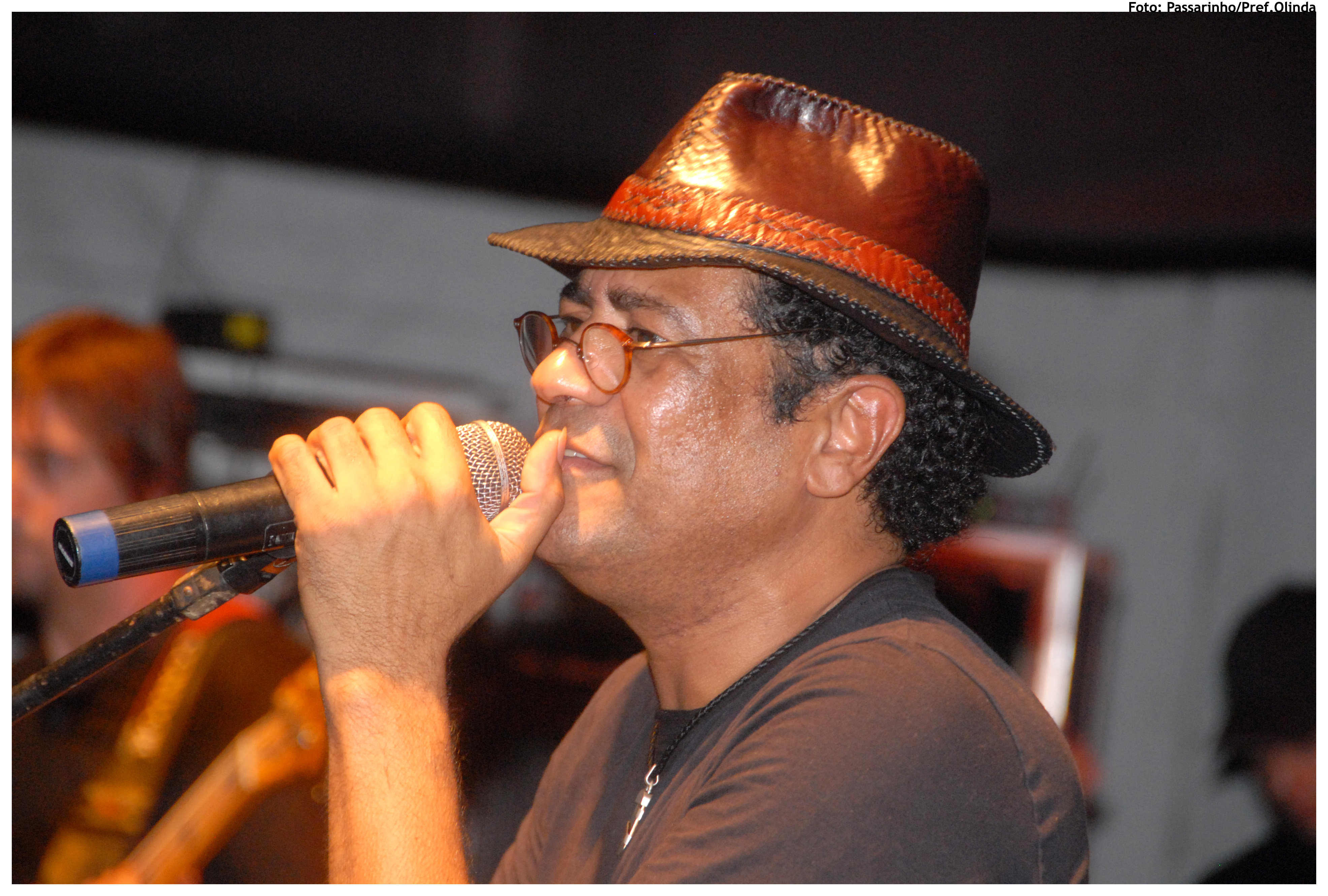 Maciel Melo (Iguaraci, Pernambuco, 26 de maio de 1962) é um cantor e compositor brasileiro. Maciel destacou-se na história da música nordestina com o clássico Caboclo Sonhador, sucesso nas interpretações de Flávio José e Fagner. Na foto, Maciel canta na festa de são joão de Olinda.